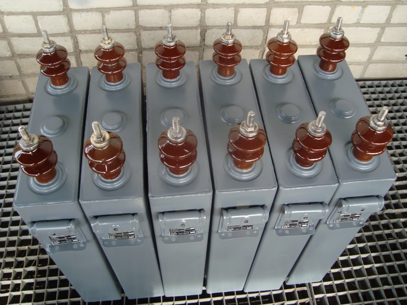 конденсатор